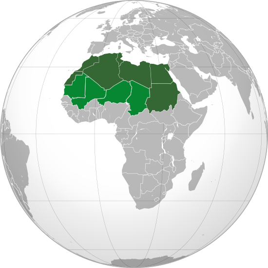 Vyznačené sú štáty Severnej Afriky